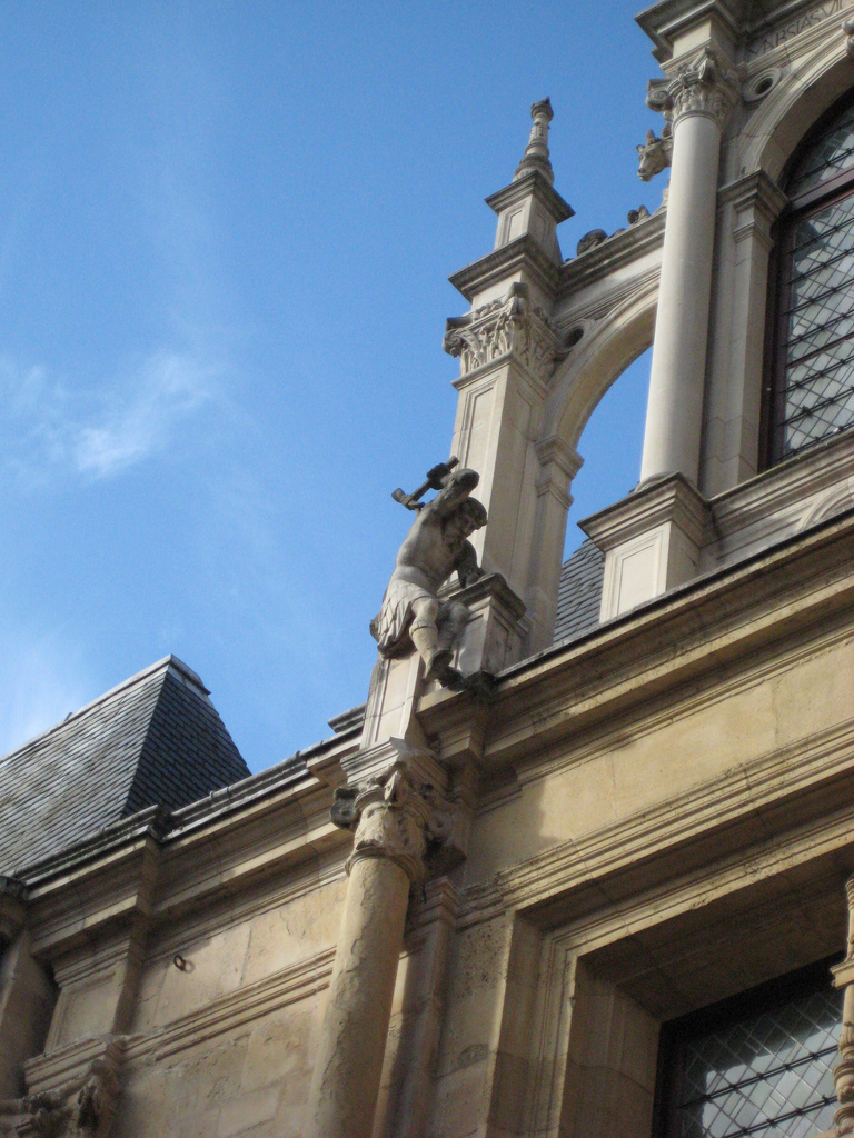 Détail de la lucarne de la façade occidentale de la cour de l'hôtel d'Escoville à Caen.